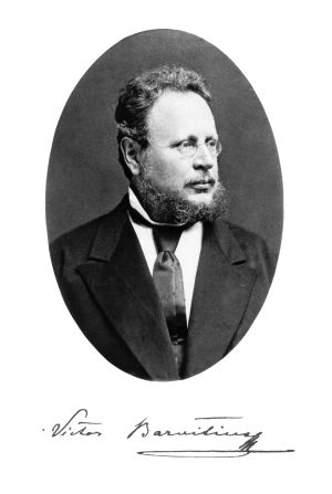 malíř Victor Barvitius